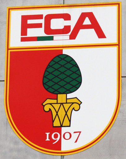 Foto des FC-Augsburg-Logos an der WWK Arena